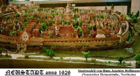 Prudnik (Neustadt) anno 1626, Stadtmodell von Hans-Joachim Hoffmann (Neustädter Heimatstube, Northeim)